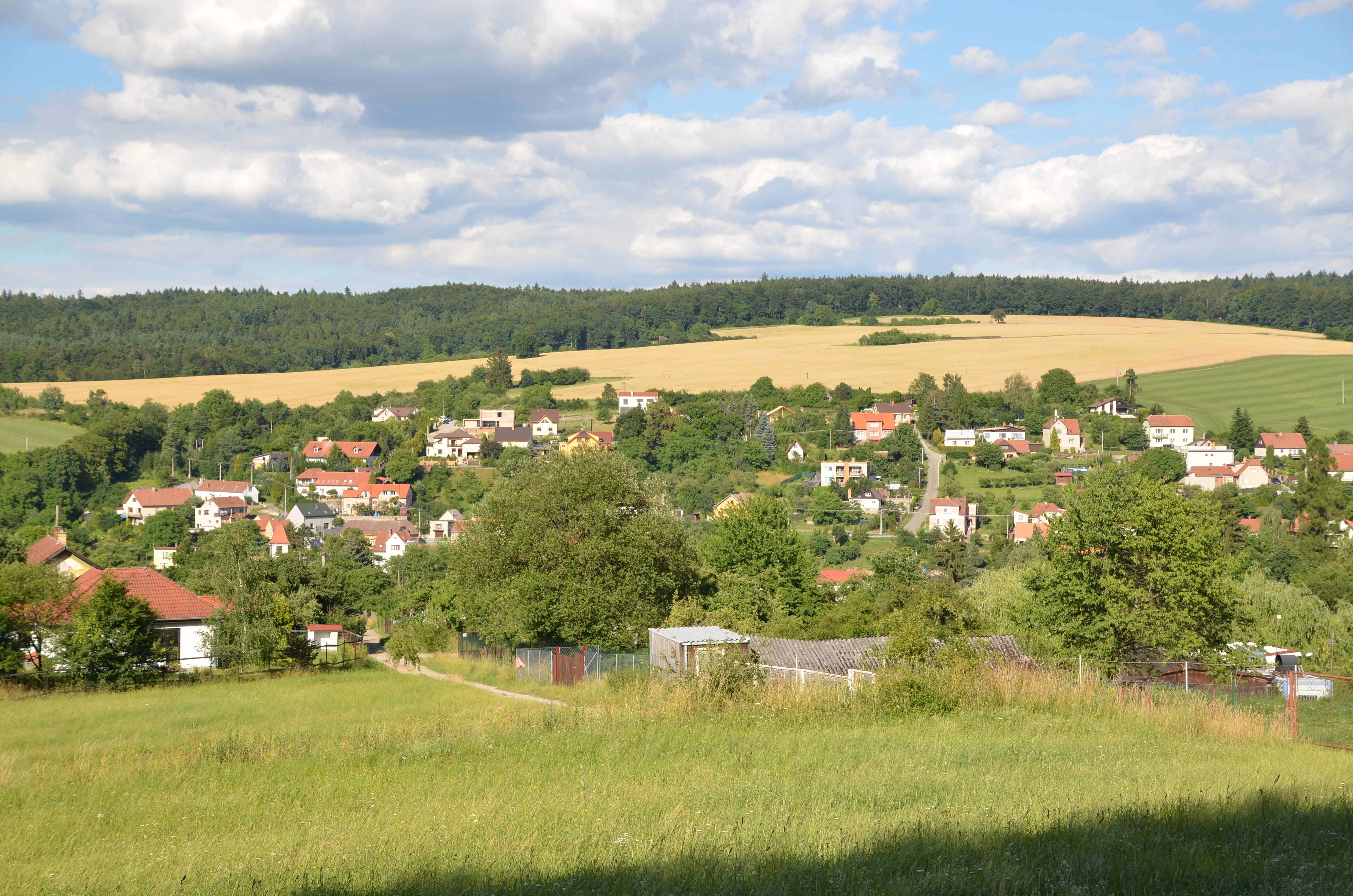 Pohled na Olomučany od východu